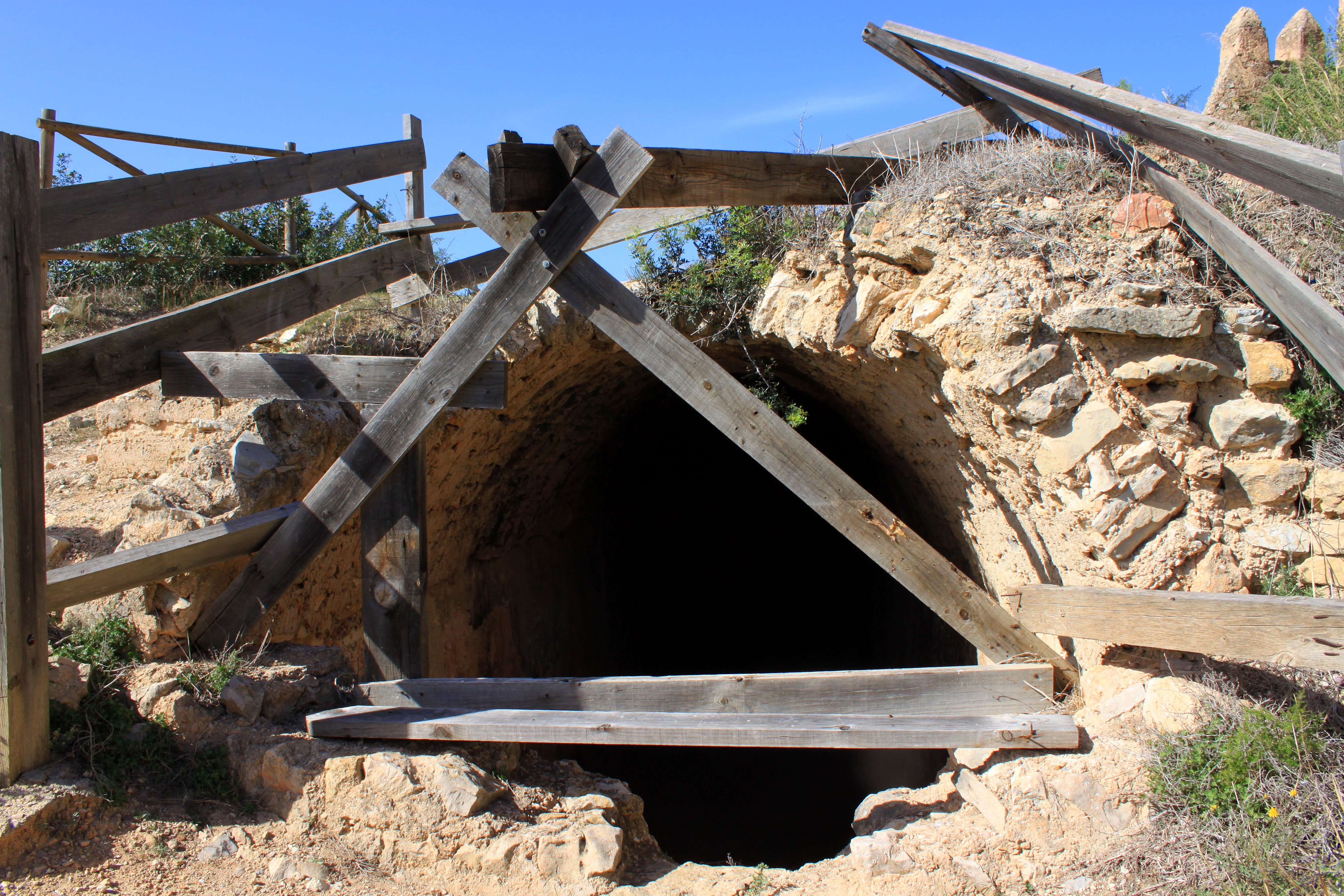 Castillo de Xivert. Estado actual del aljibe islámico situado en el albacar de la alcazaba. Alcalá de Xivert, provincia de Castellón, Comunidad Valenciana, España.